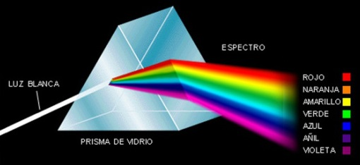 Argiaren deskonposaketa prisma baten bidez.